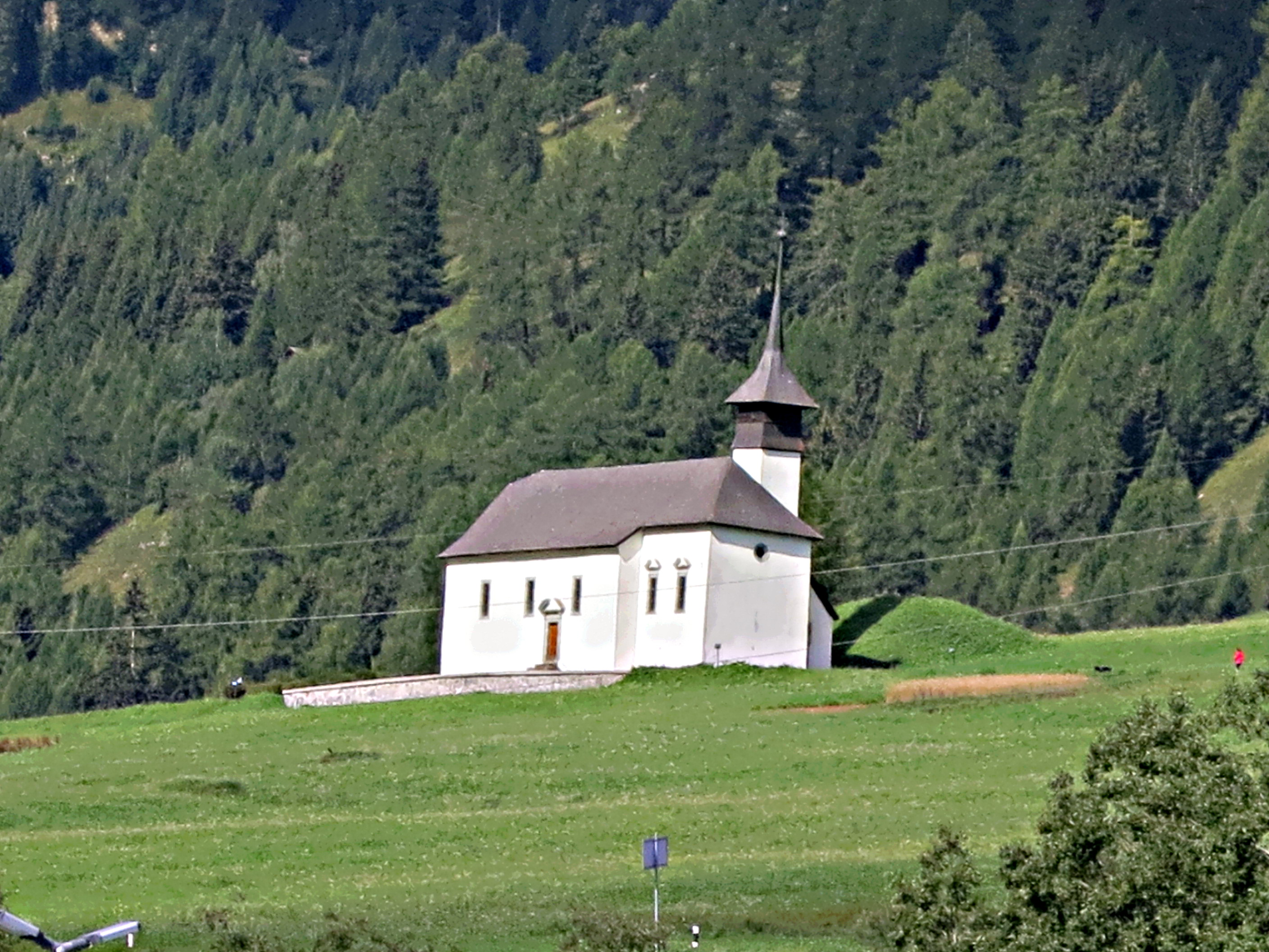 Kapelle Mutter Gottes, Ritzingen VS, Schweiz